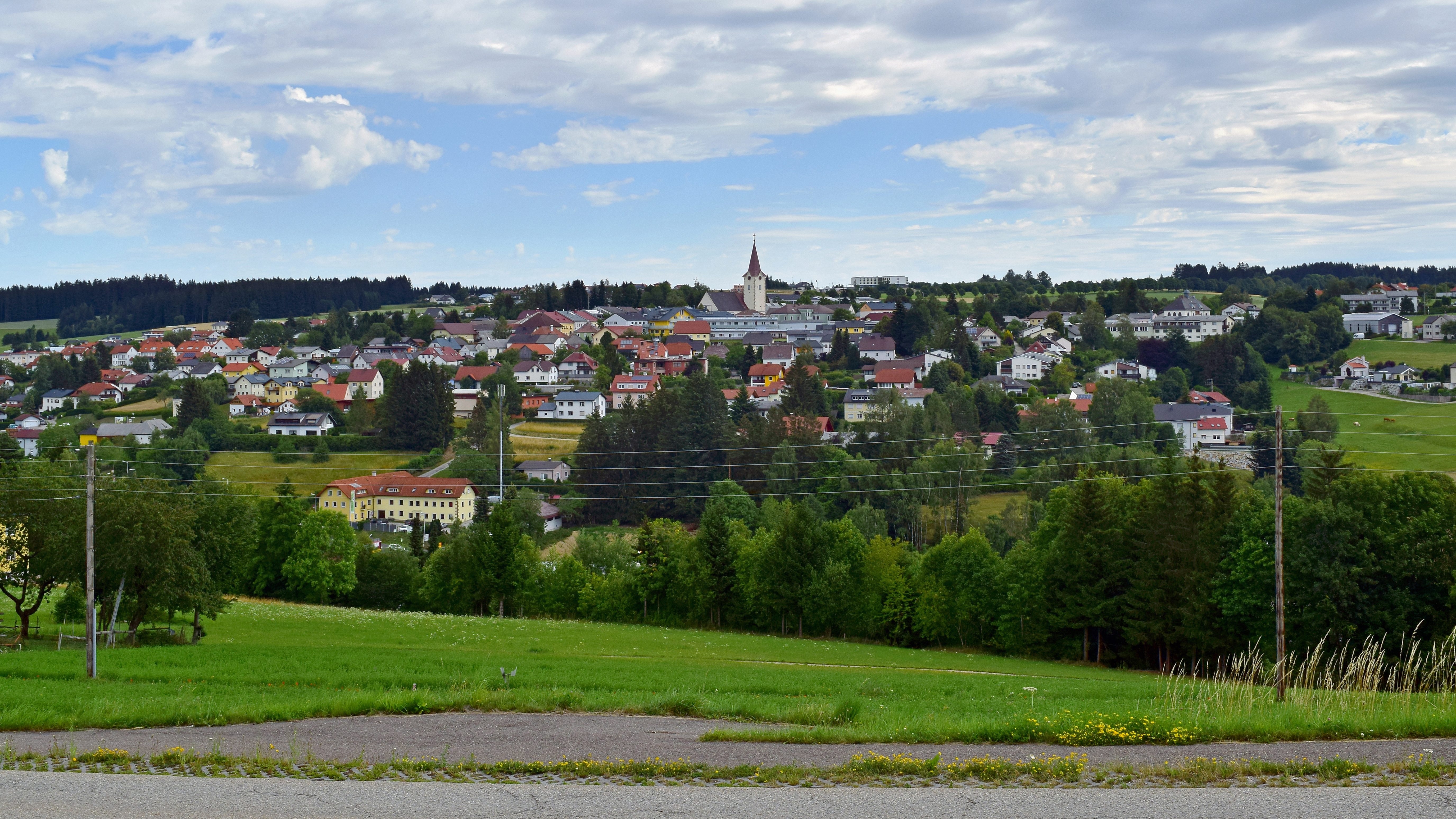 Ortsansicht von Hellmonsödt